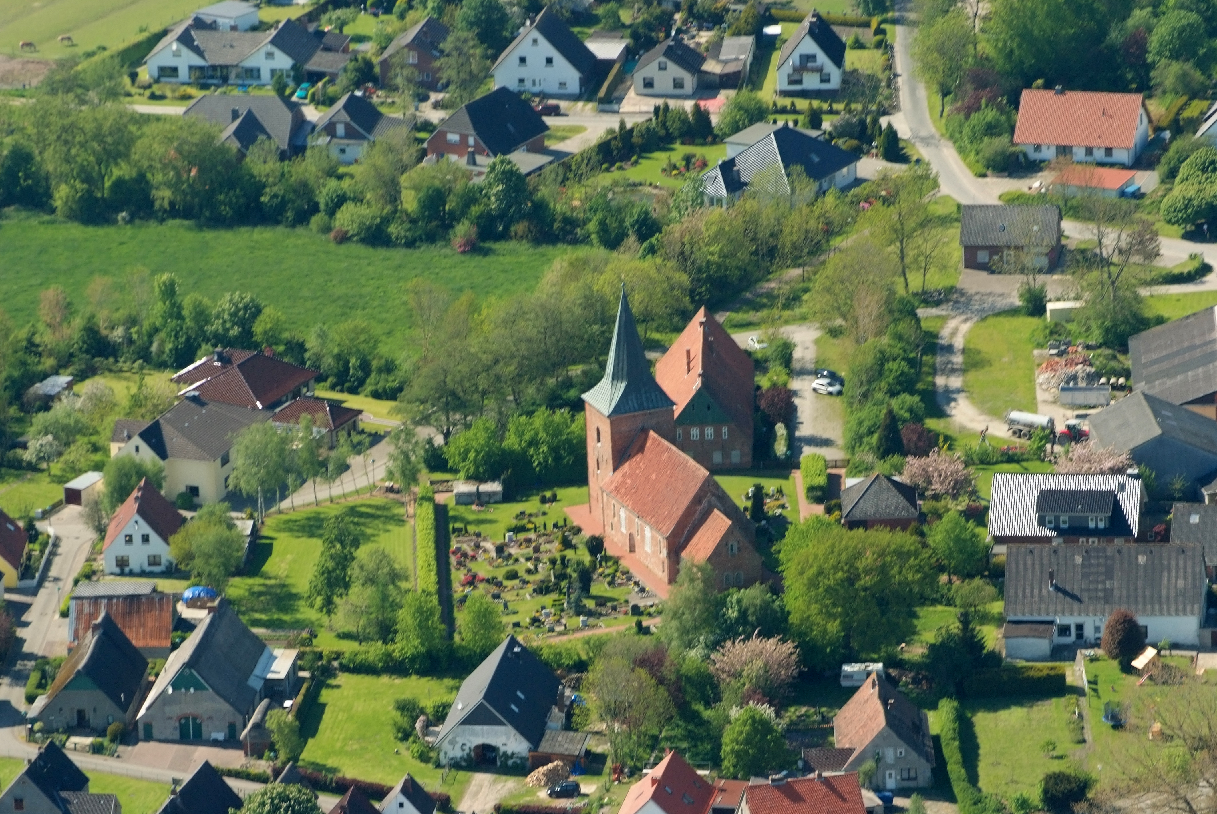 Katharinenkirche Misselwarden Fotoflug vom Flugplatz Nordholz-Spieka über Bremerhaven, Wilhelmshaven und die Ostfriesischen Inseln bis Borkum